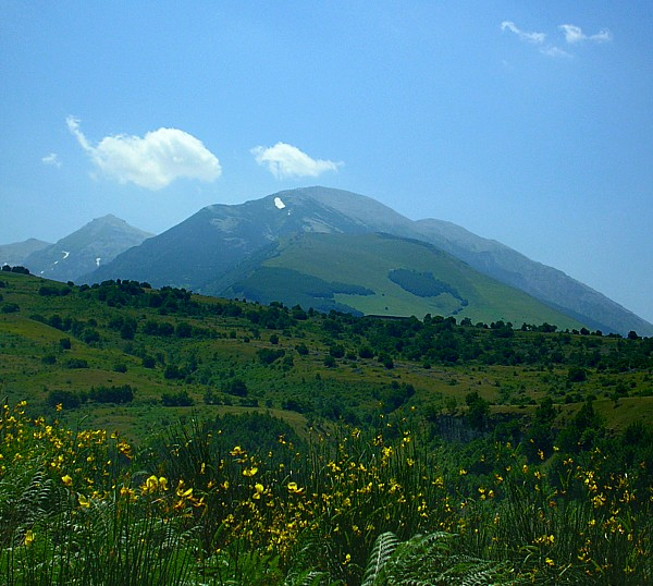 Maiella, vanuit het zuidoosten categorie:Afbeelding Abruzzen